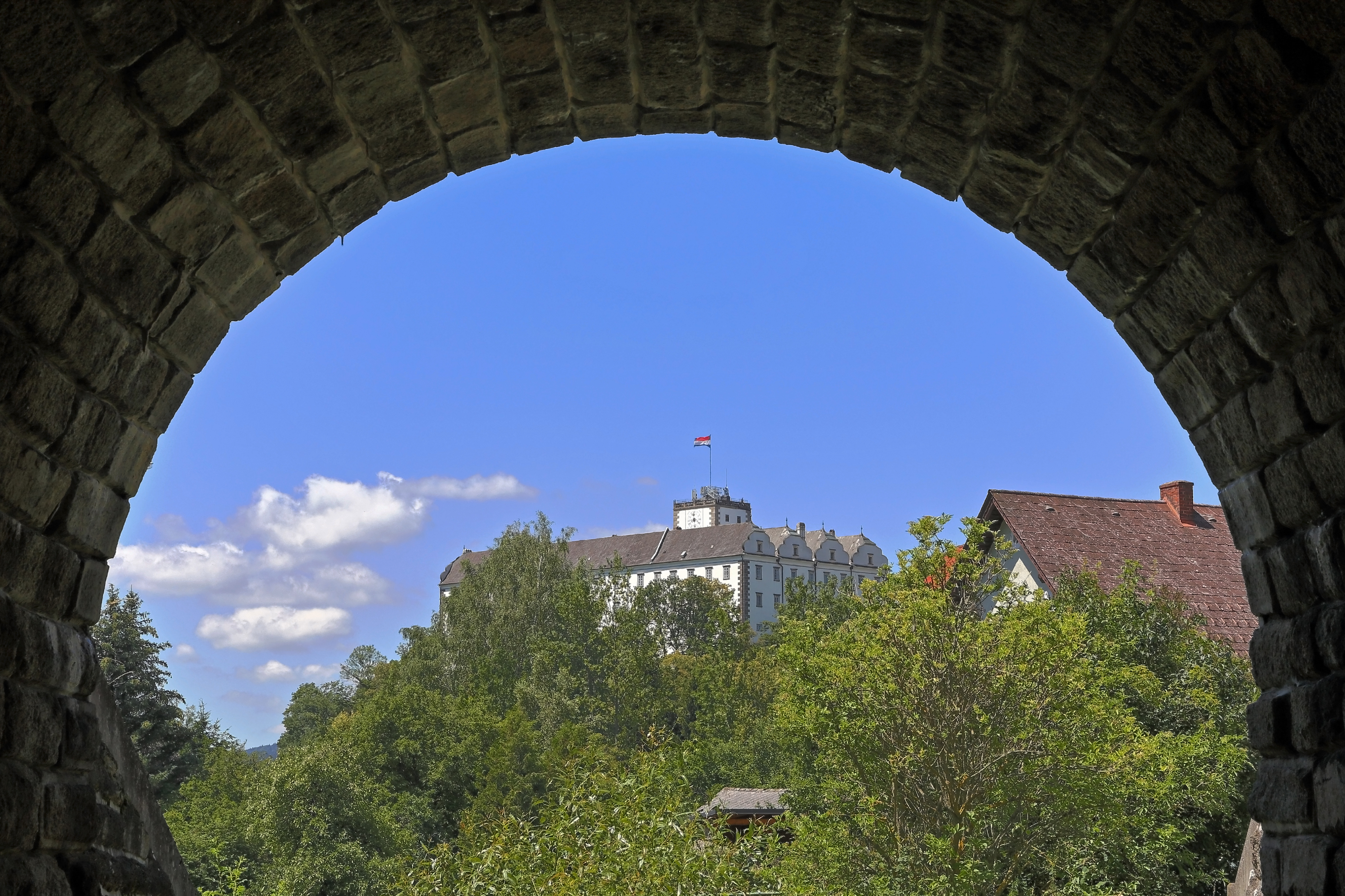 Blick auf Schloss Weitra von einer Unterführung der Waldviertler Schmalspurbahn.